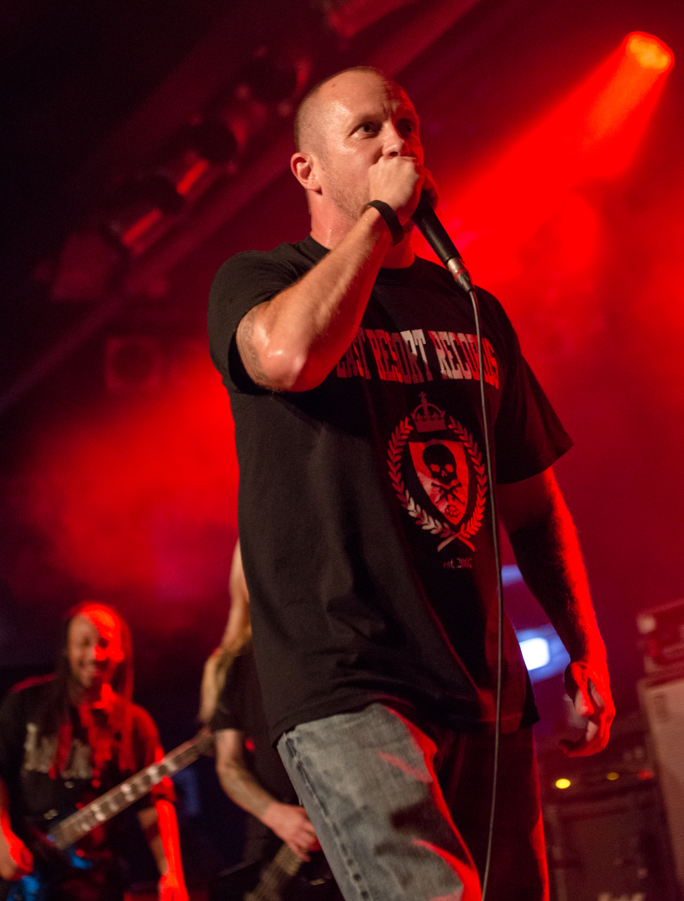 de